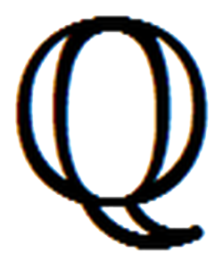 Ռացիոնալ թվերի բազմության նշանը